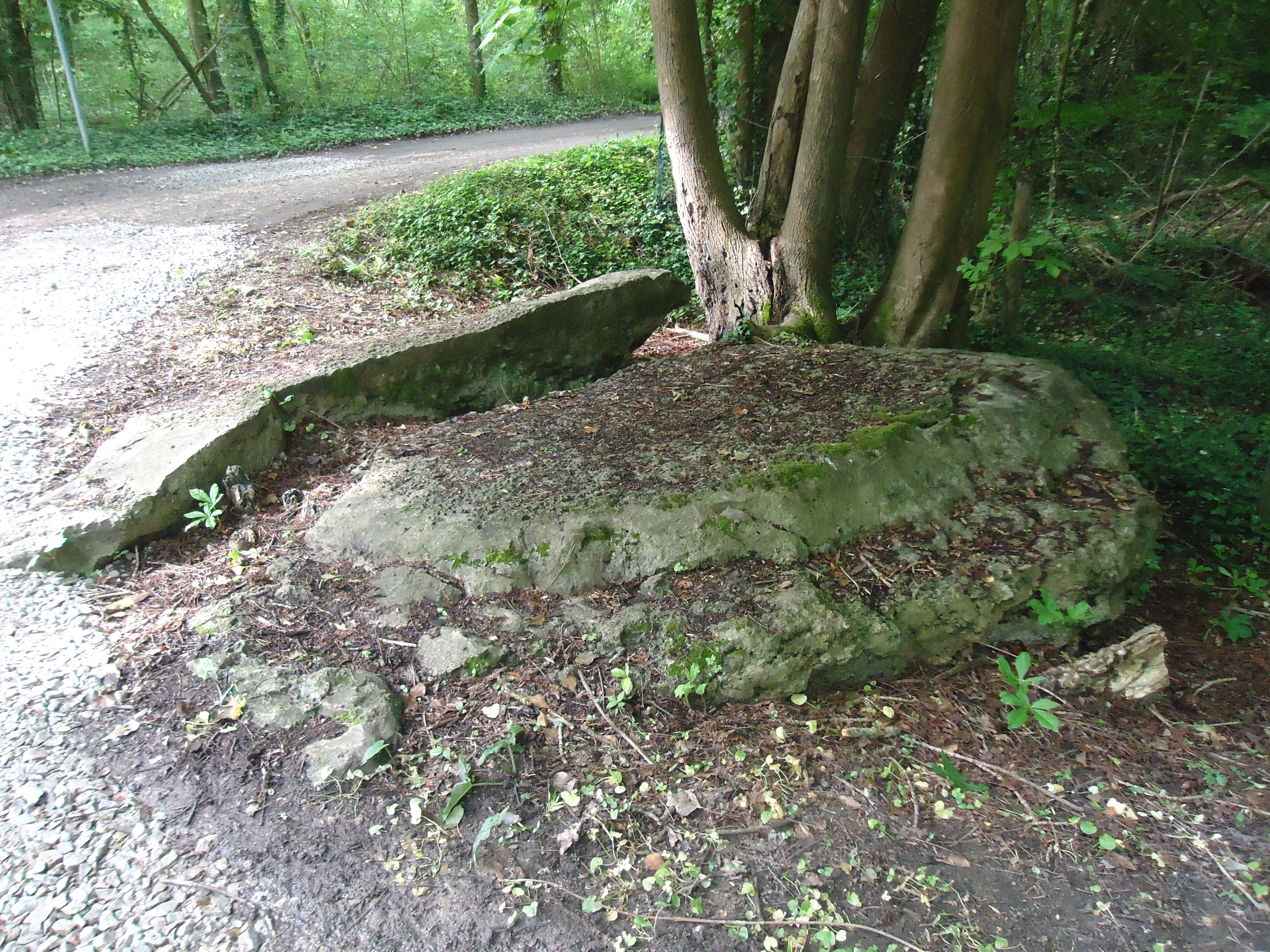 Dolmen brisé dit Gravier de Gargantua à Croth dans l'Eure